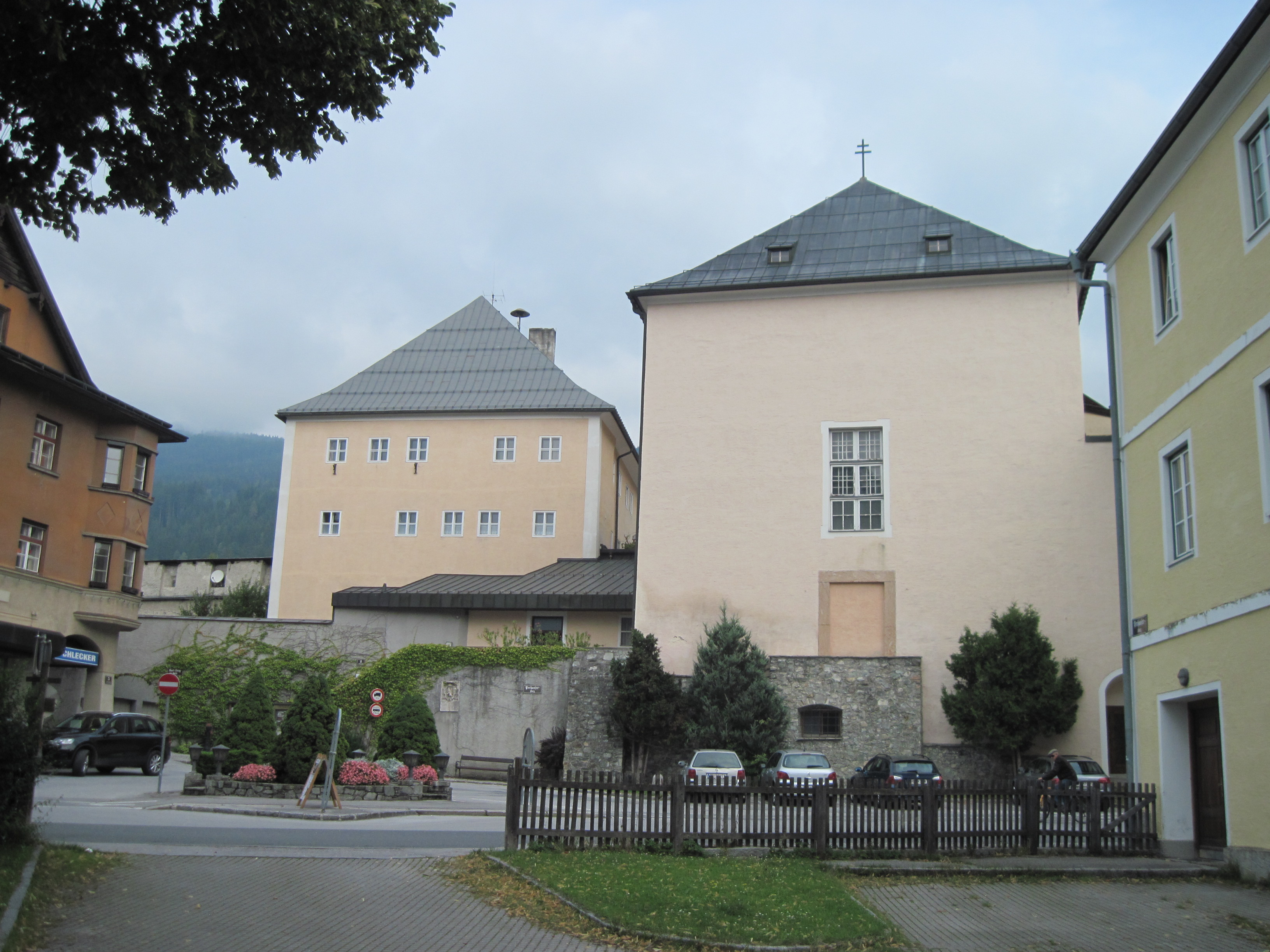 Ehem. Burg, ehem. Kapuzinerkloster, Pfarrhof